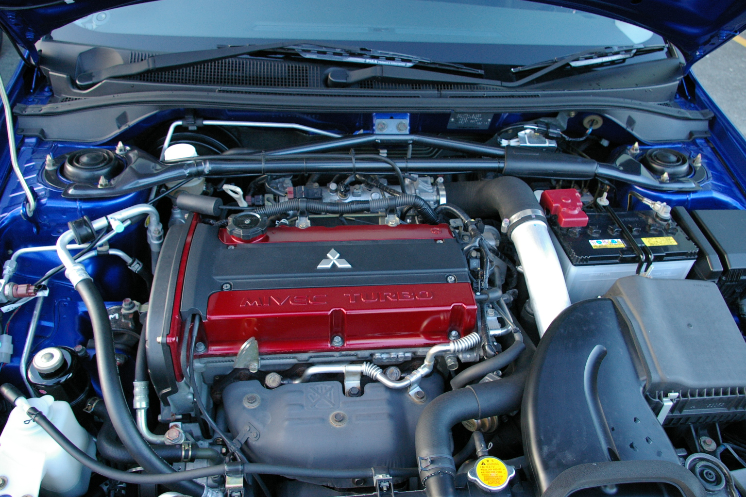 Mitsubishi 4G63 MIVEC.